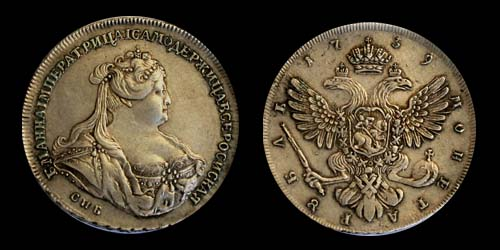 Рубль Анны Иоанновны 1739, серебро